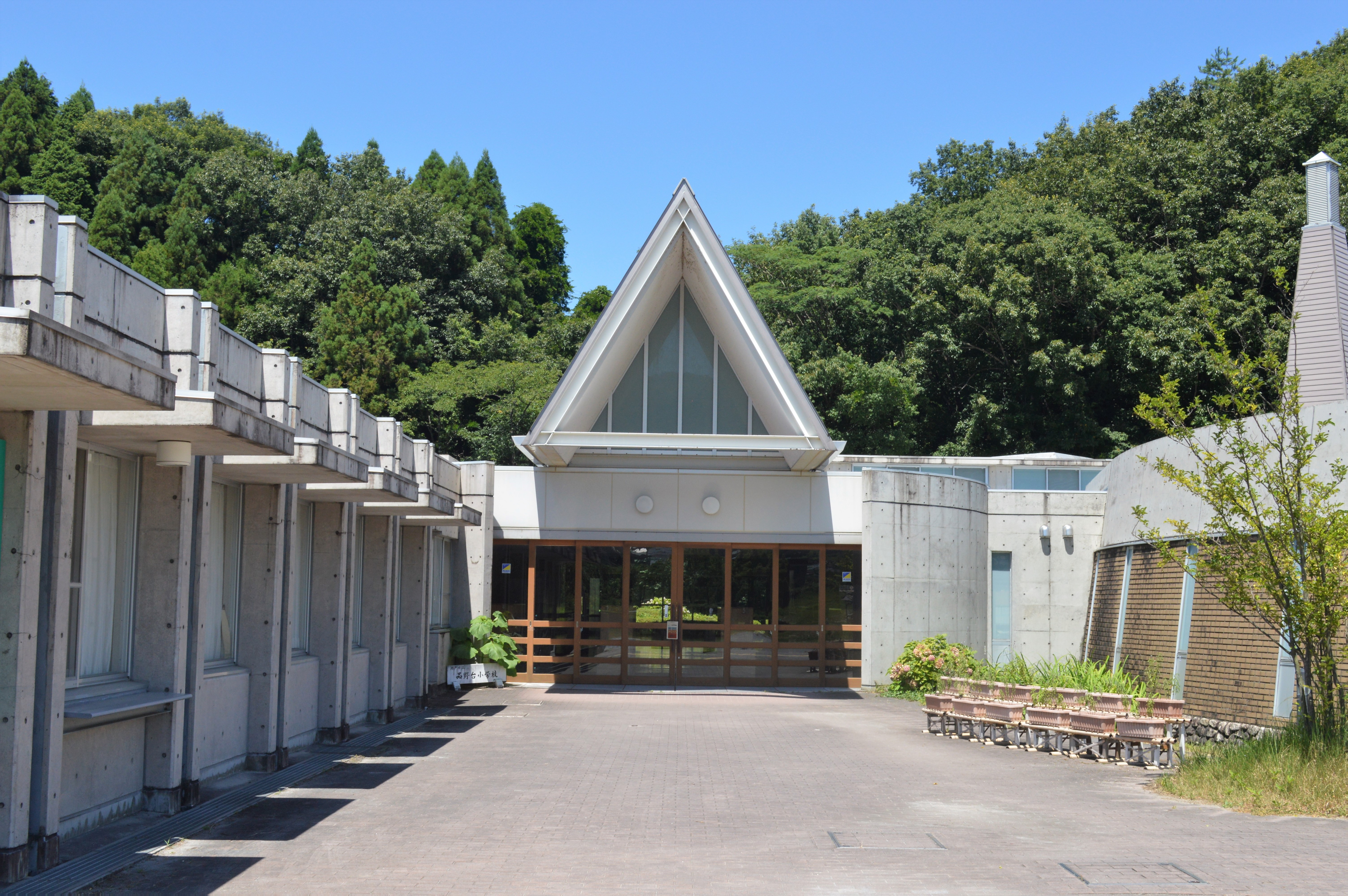 愛知県の瀬戸市立品野台小学校。地域図書館が開放されている日曜日に撮影。